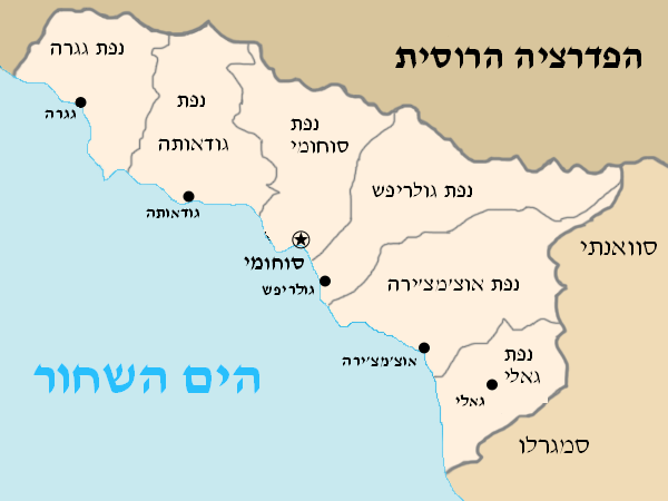 נפות מחוז אבחזיה בגאורגיה